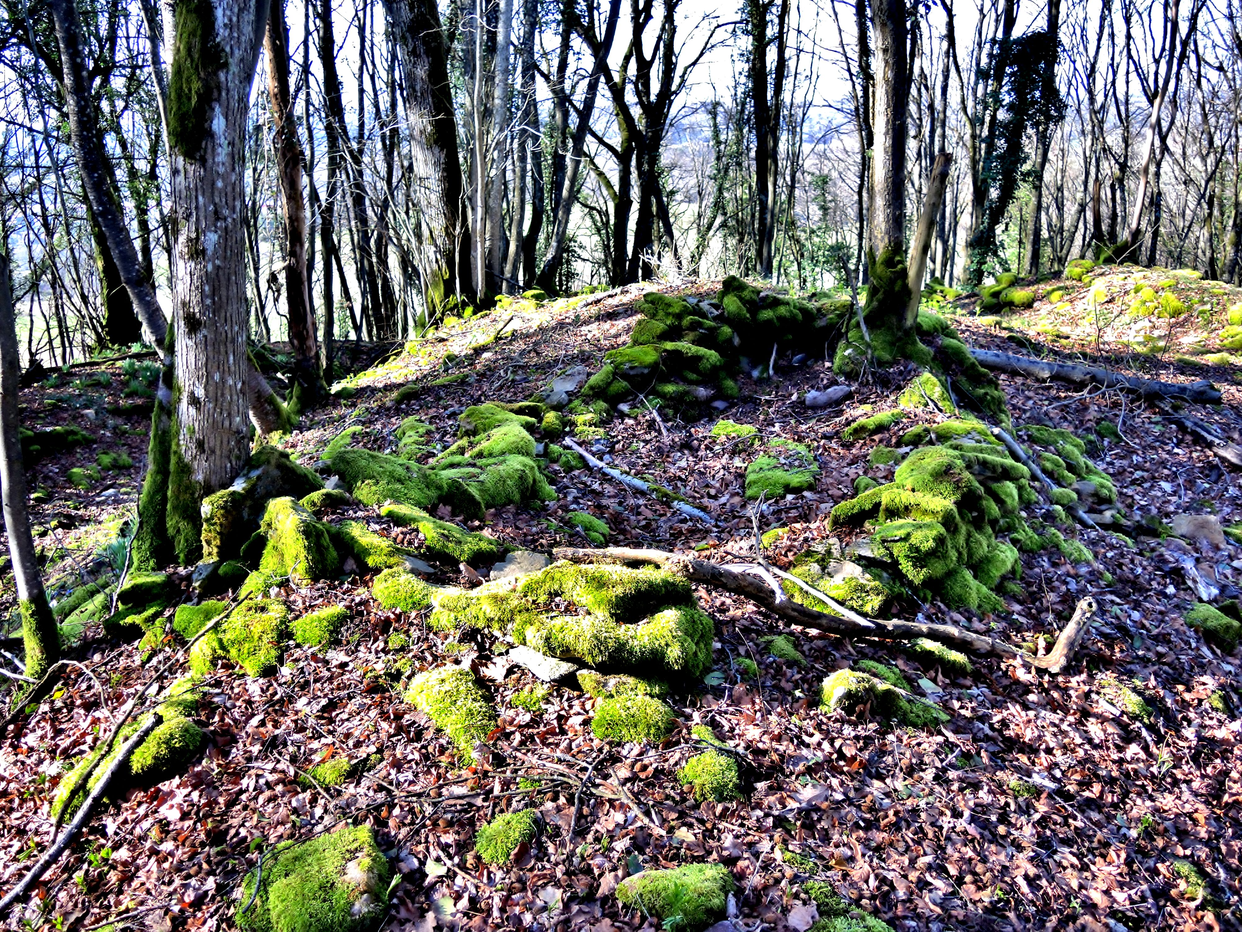 Autre vue des restes de la tour Nord-Ouest du Châtelot, à Saulnot